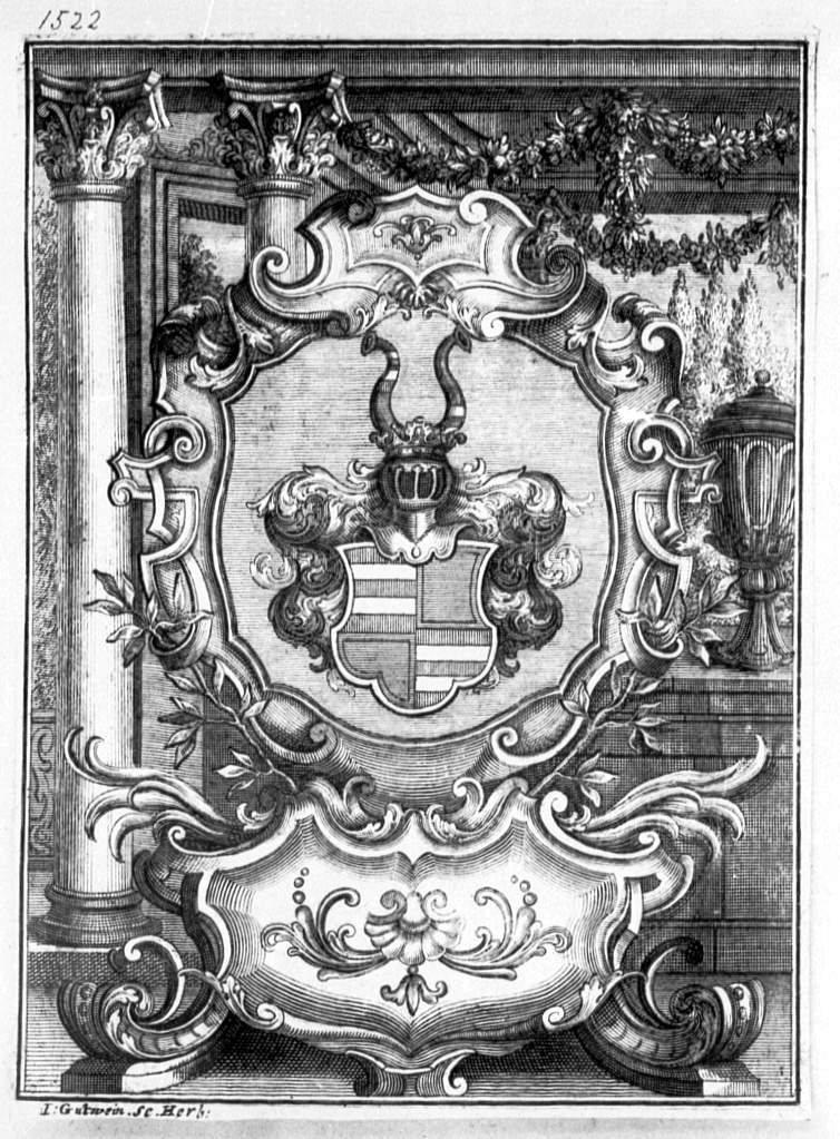 Ex libris: Wappen der Freiherren von Erthal, ca. 1786–1800; München, private Sammlung